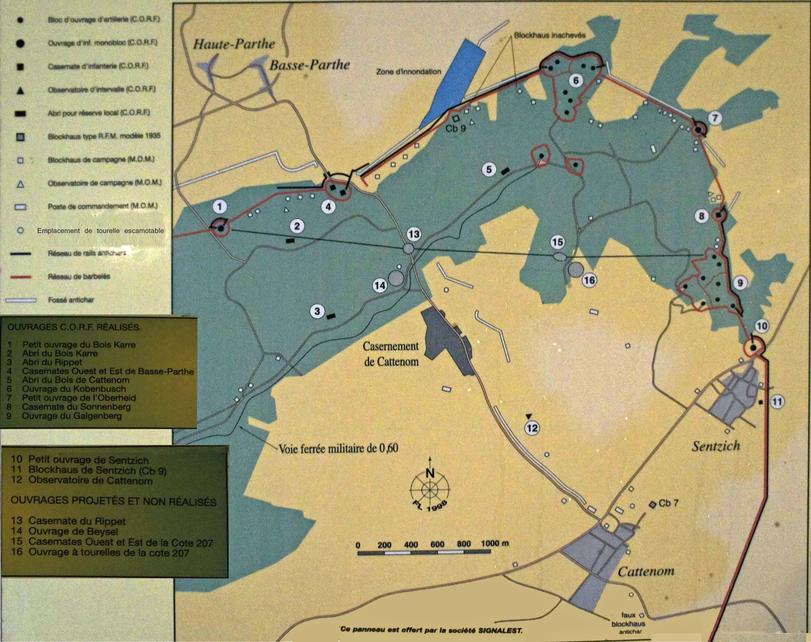 Plan des forts de la forêt de Cattenom, exposé à l'ouvrage du Galgenberg. Version modifiée et téléversée en février 2012..